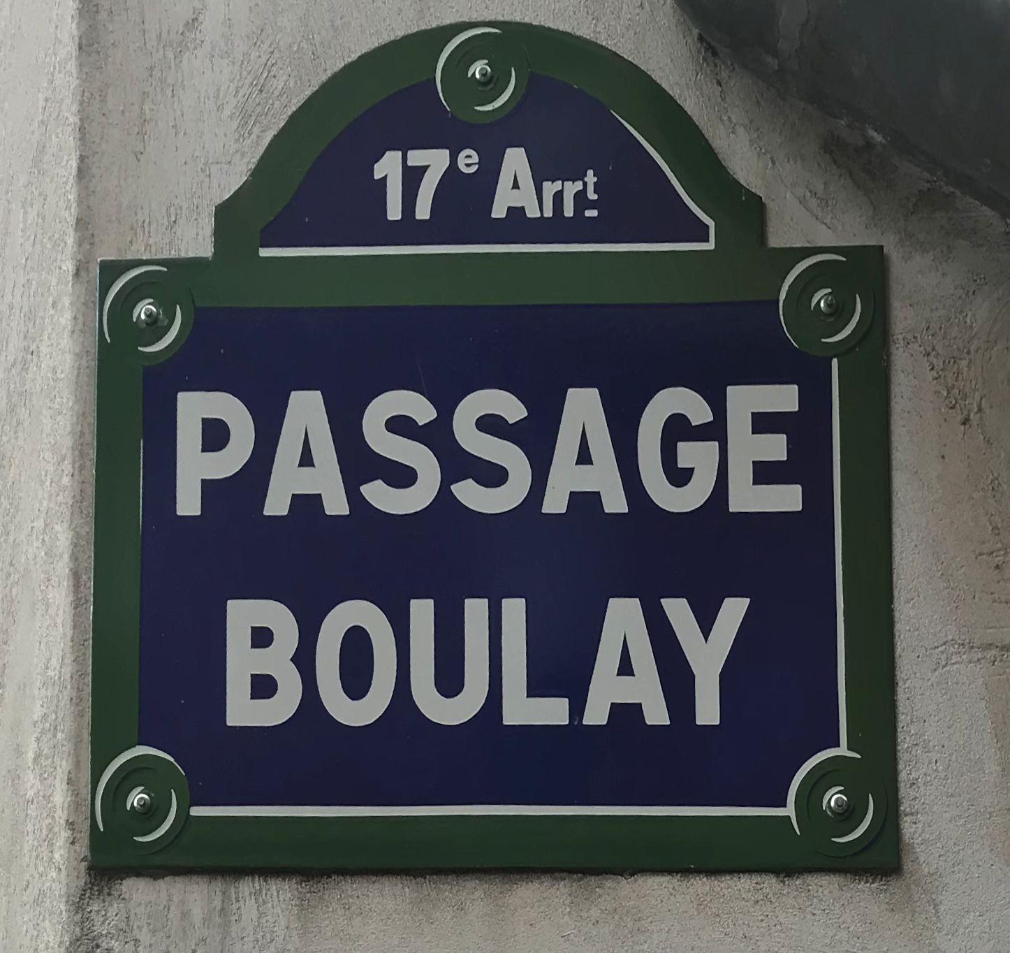 Image de Paris, septembre 2018.